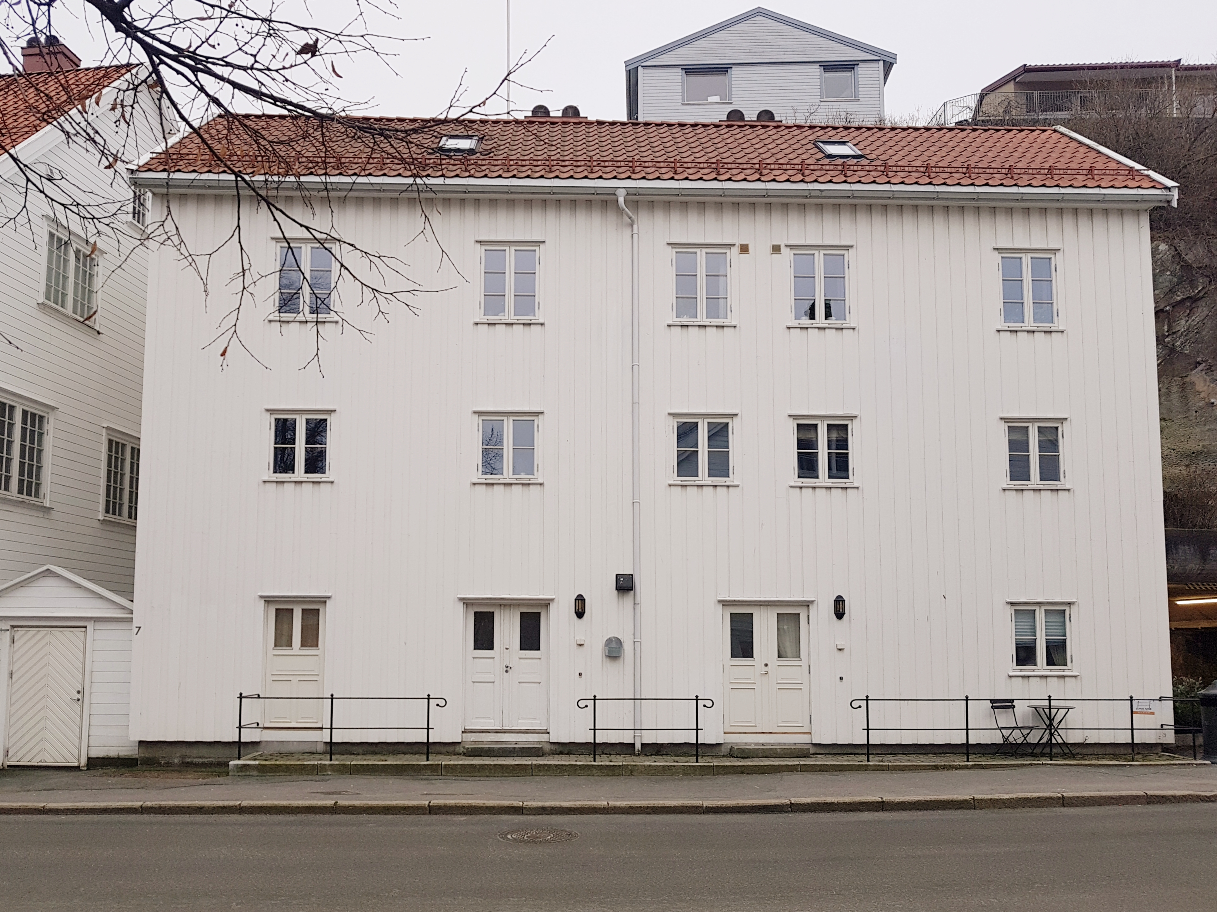 Det hvite hus på Teaterplassen